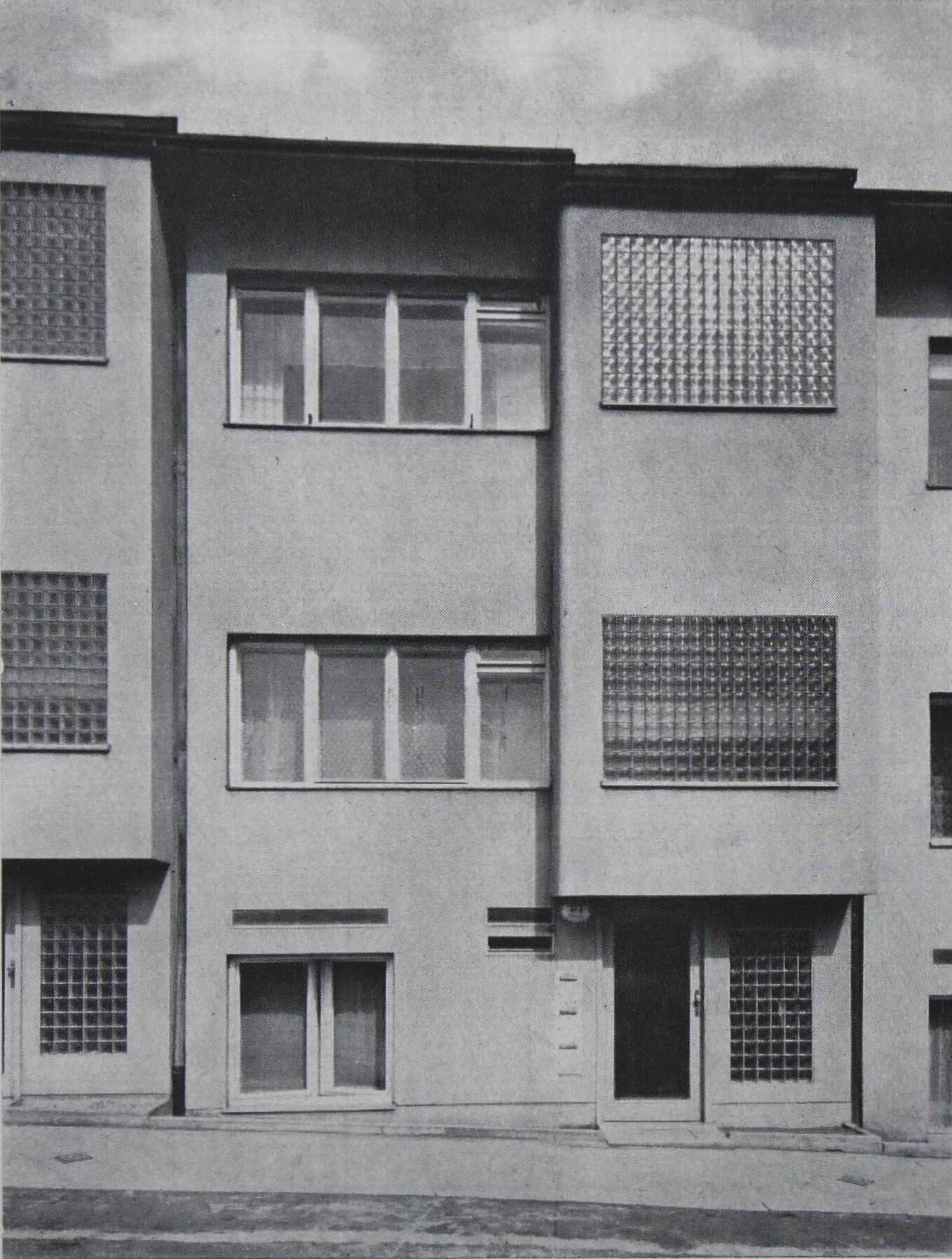 Detail průčelí řadových domů v Brně-Řečkovicích, Sibiřská 49-53b, (arch. F. A. Krejčí, 1938)